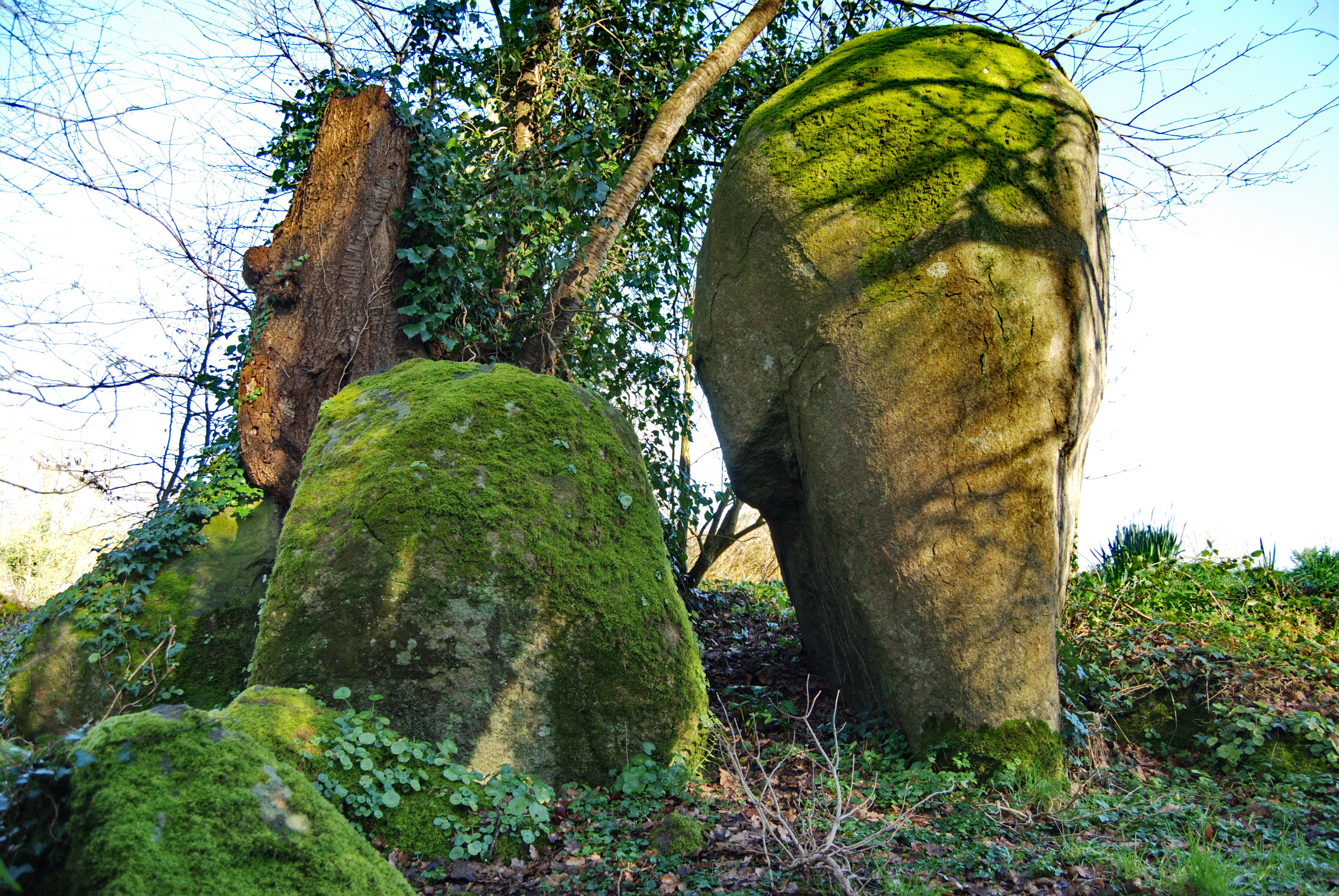 Lanrelas - Le menhir des Aulnais